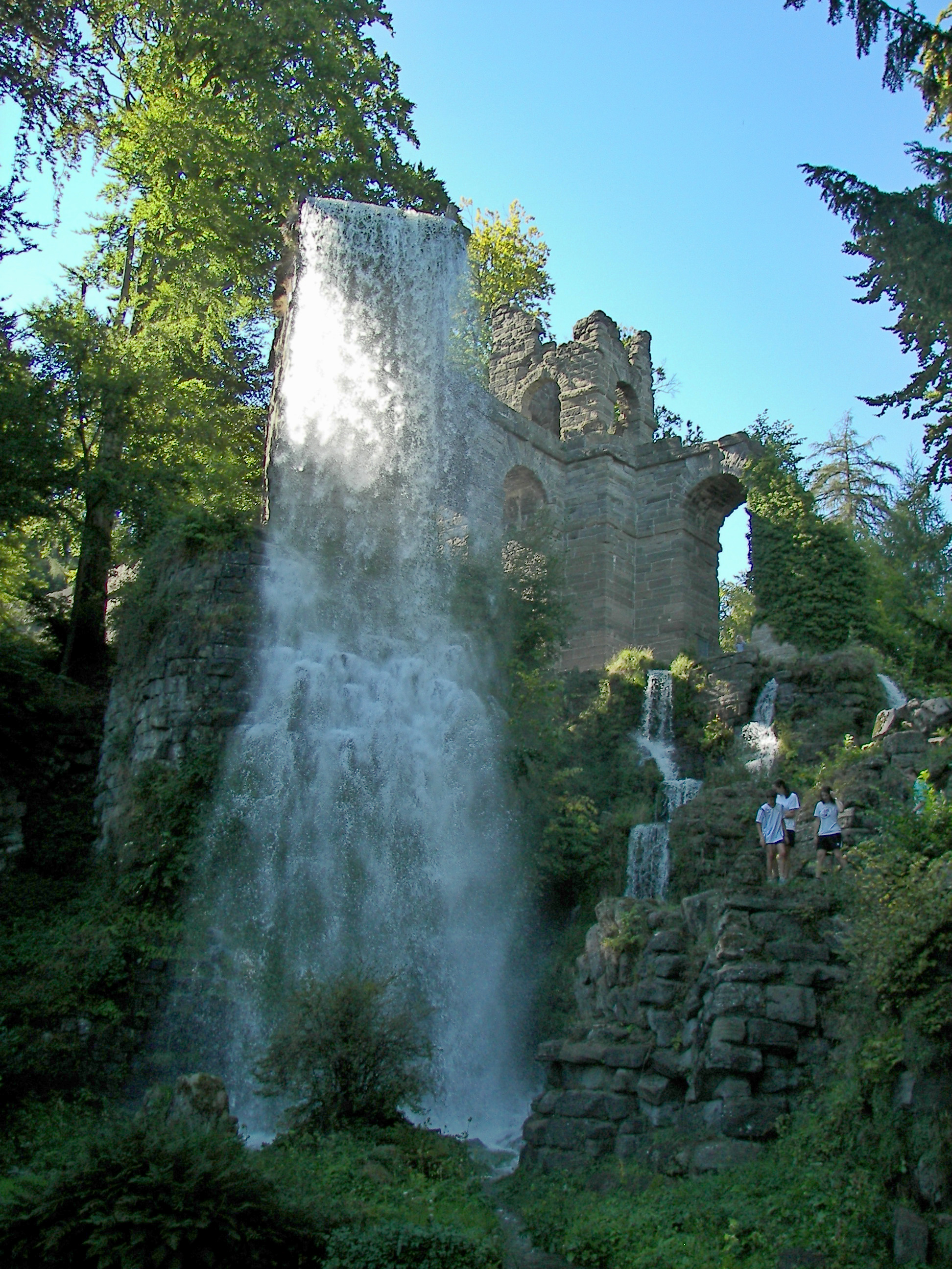 Kassel, Schlosspark Wilhelmshöhe, Aquädukt